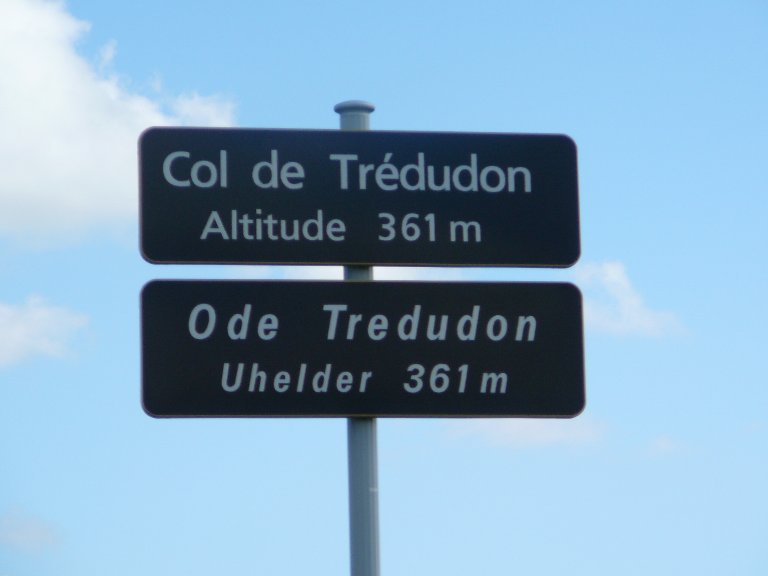 Cela fait davantage montagne! Panneau bilingue français-breton